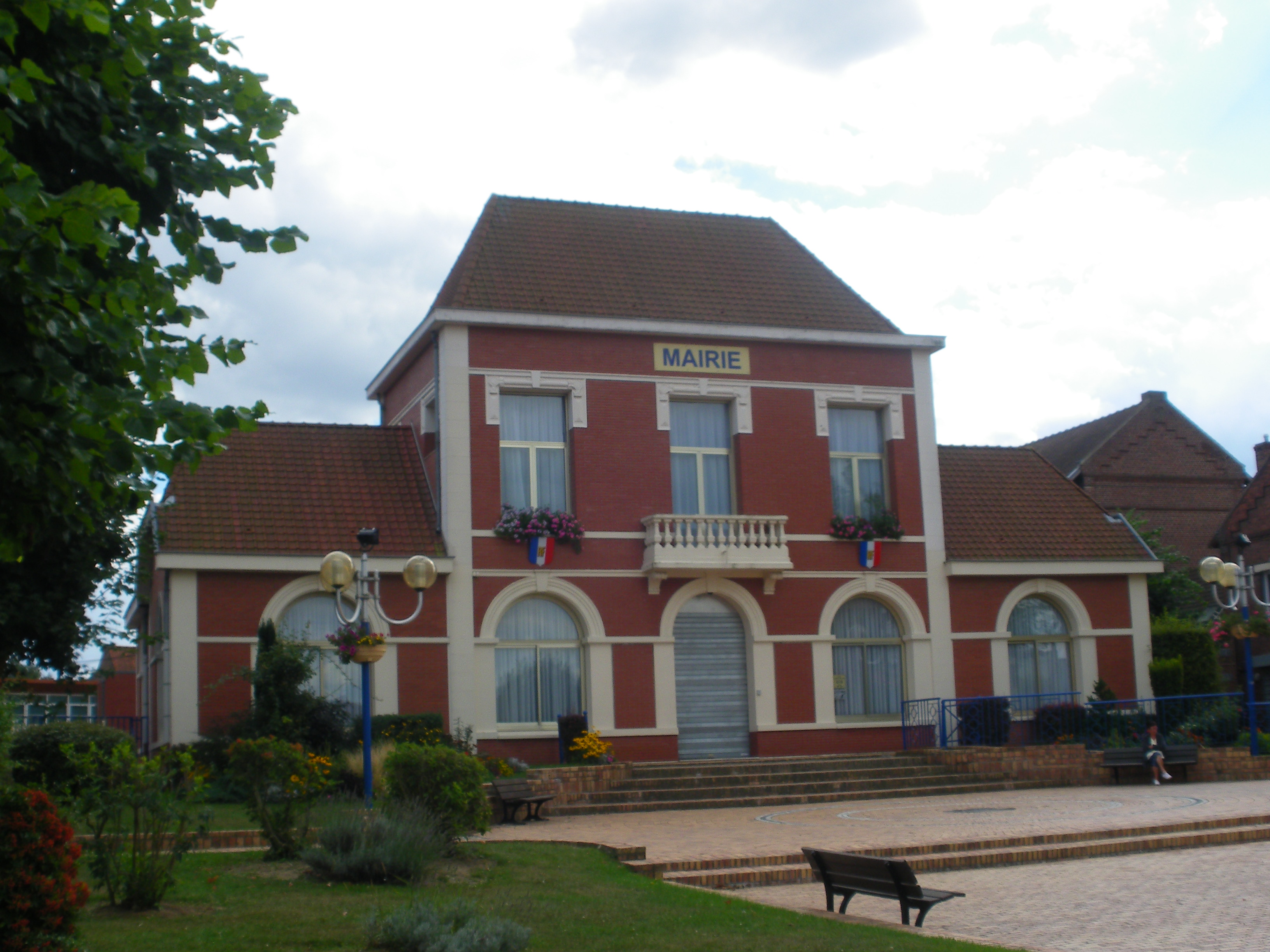 Vue de la mairie d'Annay dans le Pas-de-Calais.